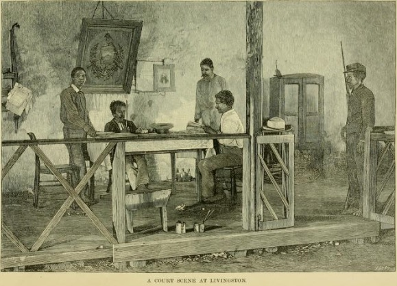 Grabado del libro Guatemala, the land of quetzal de William T. Brigham, publicado en 1887. Corte municipal de Livingston.